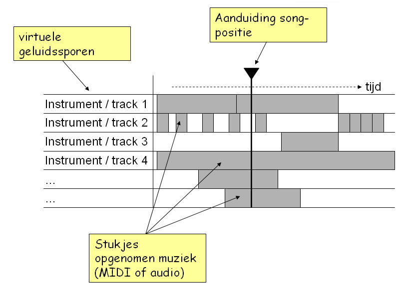 Zelfgemaakte schematische tekening